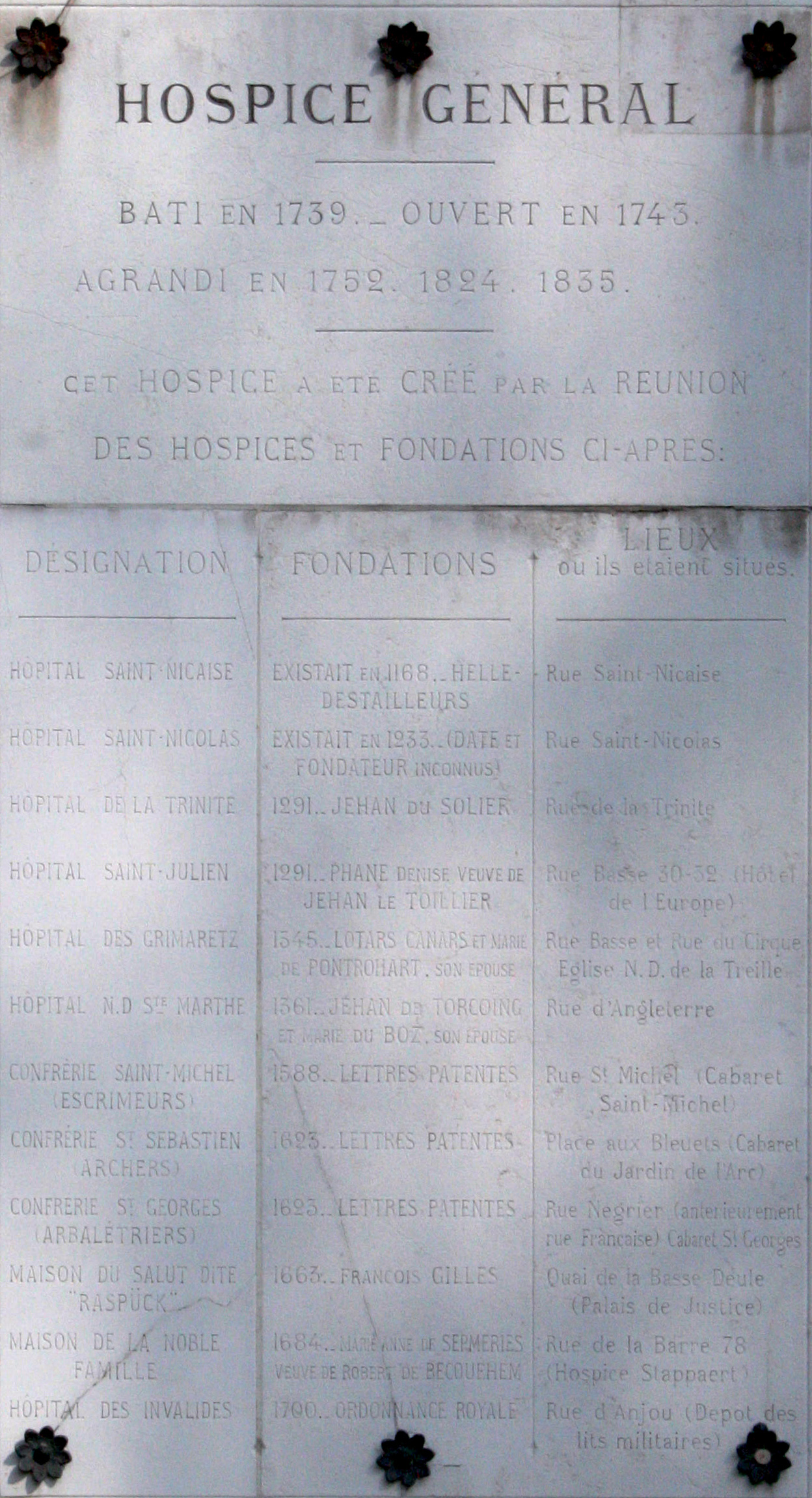 Plaque commémorative de la creation de l'Hospice Général de Lille